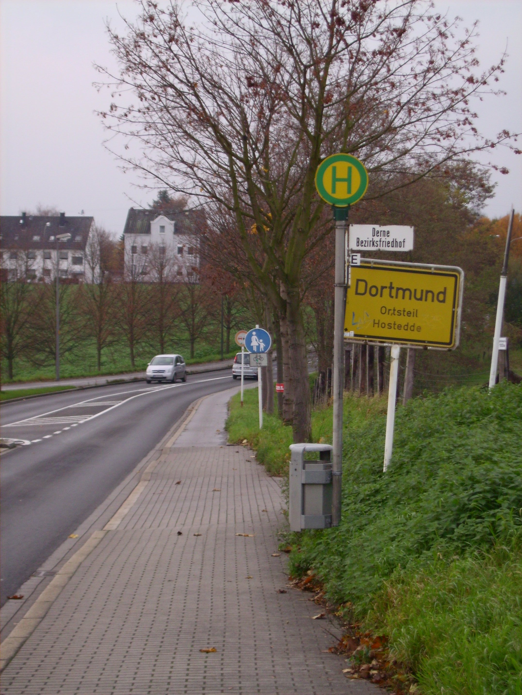 Orsteingang Hostedde mit Hostedder Straße